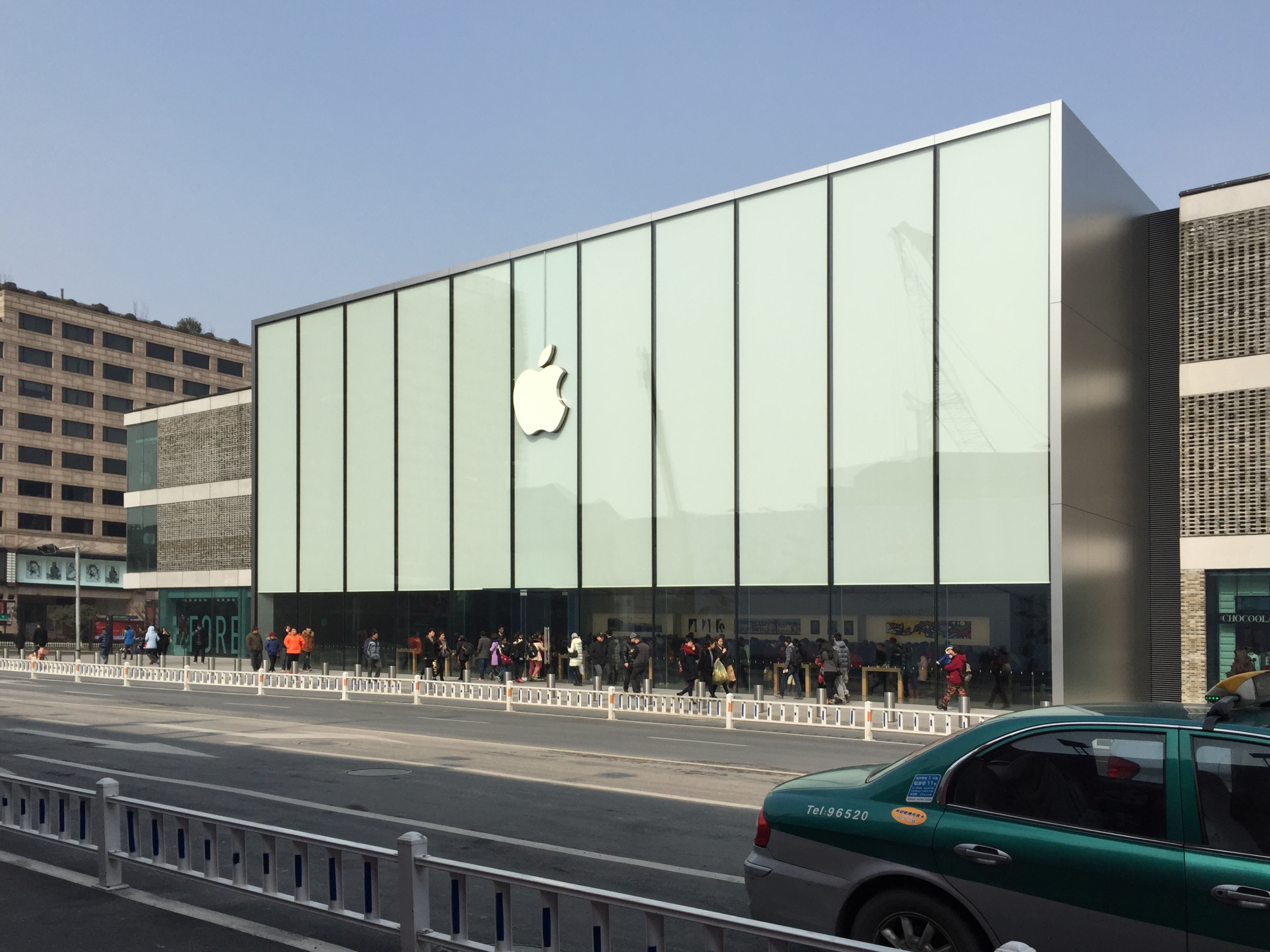 中文（中国大陆）: Apple 西湖（遮阳帘启）